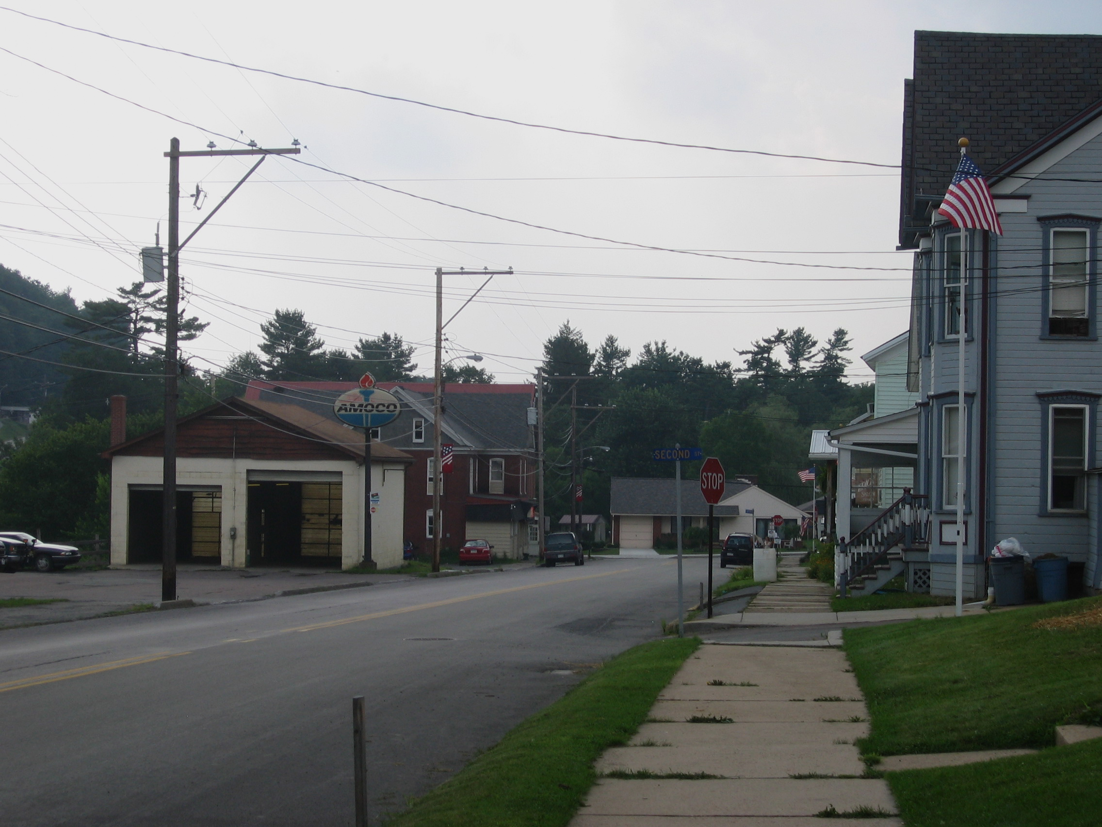 Main Street in Shanksville, Pennsylvania.